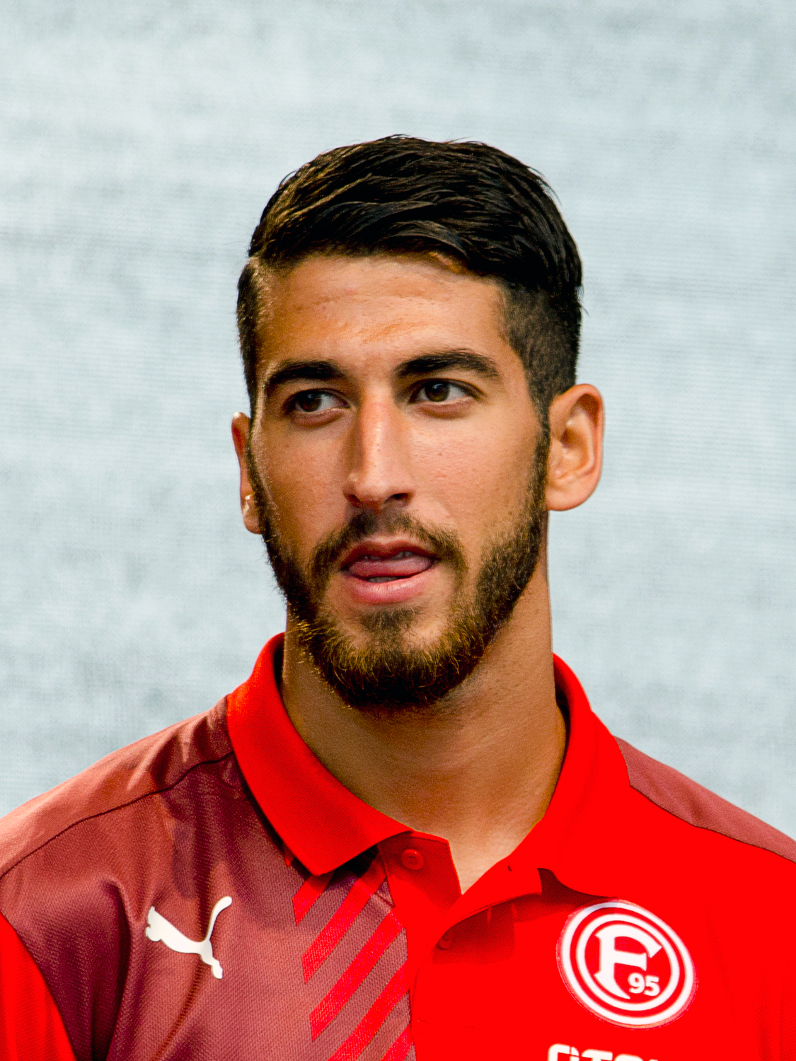 Tuğrul Erat, türkisch-aserbaidschanischer Fußballspieler